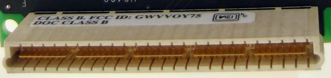 Sun MBUS male connector